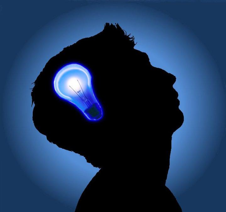 El tercer logotipo fue inspirado en los primeros dos.. usando el perfil de Jano Jimenez como base.